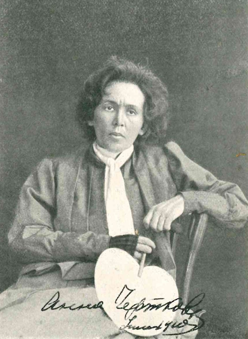 Анна Черткова в 1911 году. Фотография с автографом